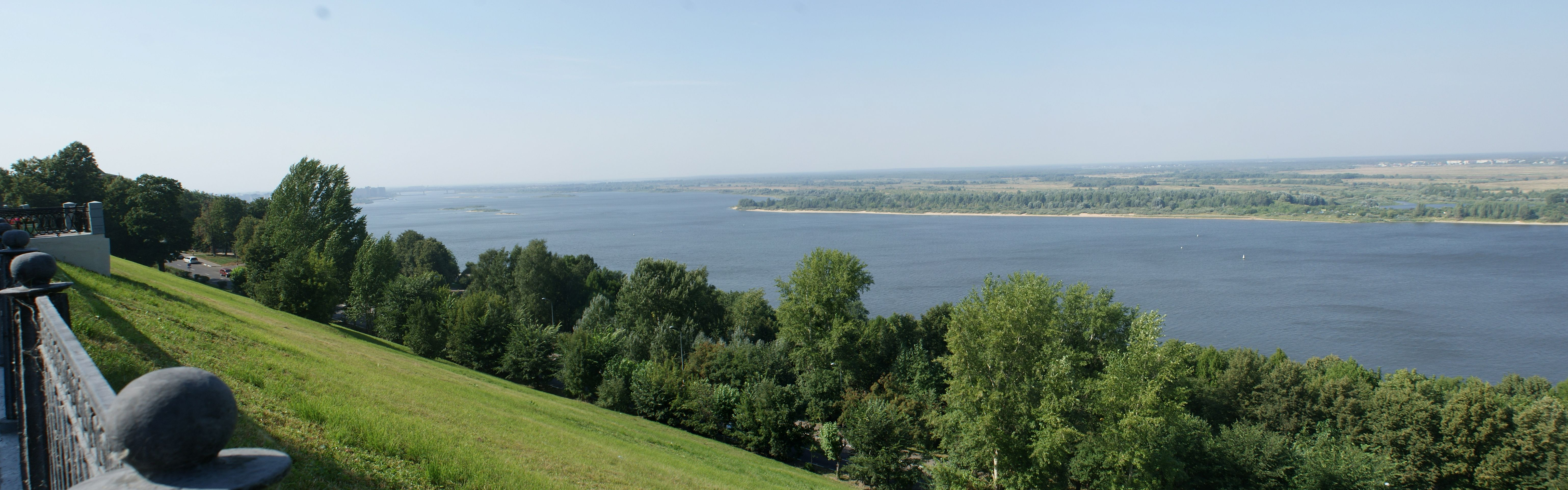 Н.Новгород. Верхневолжская набережная